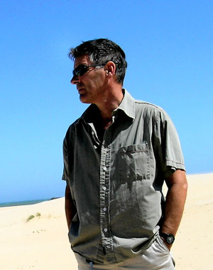 Kurt Baebi Portrait